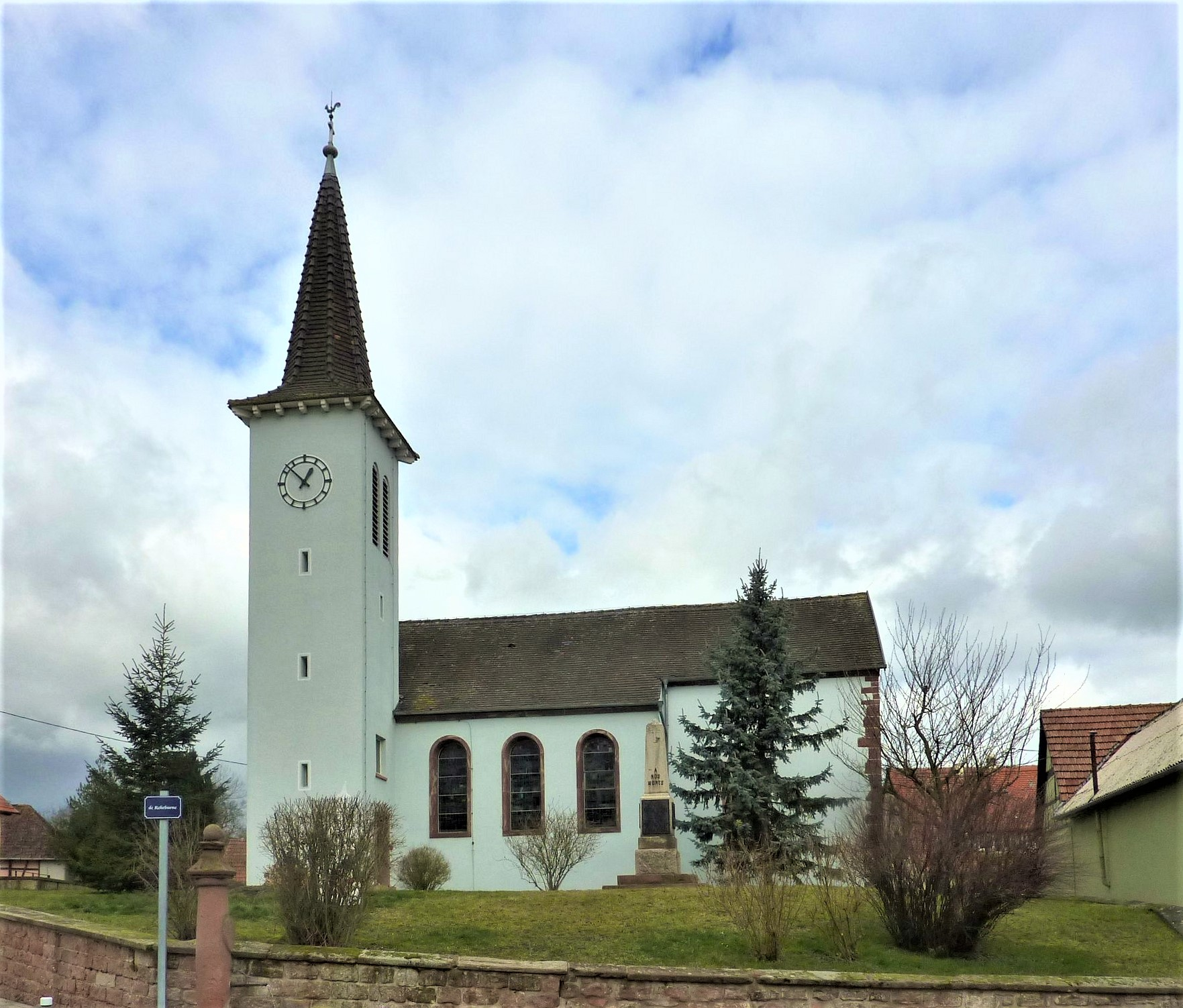 Église protestante de Mulhausen